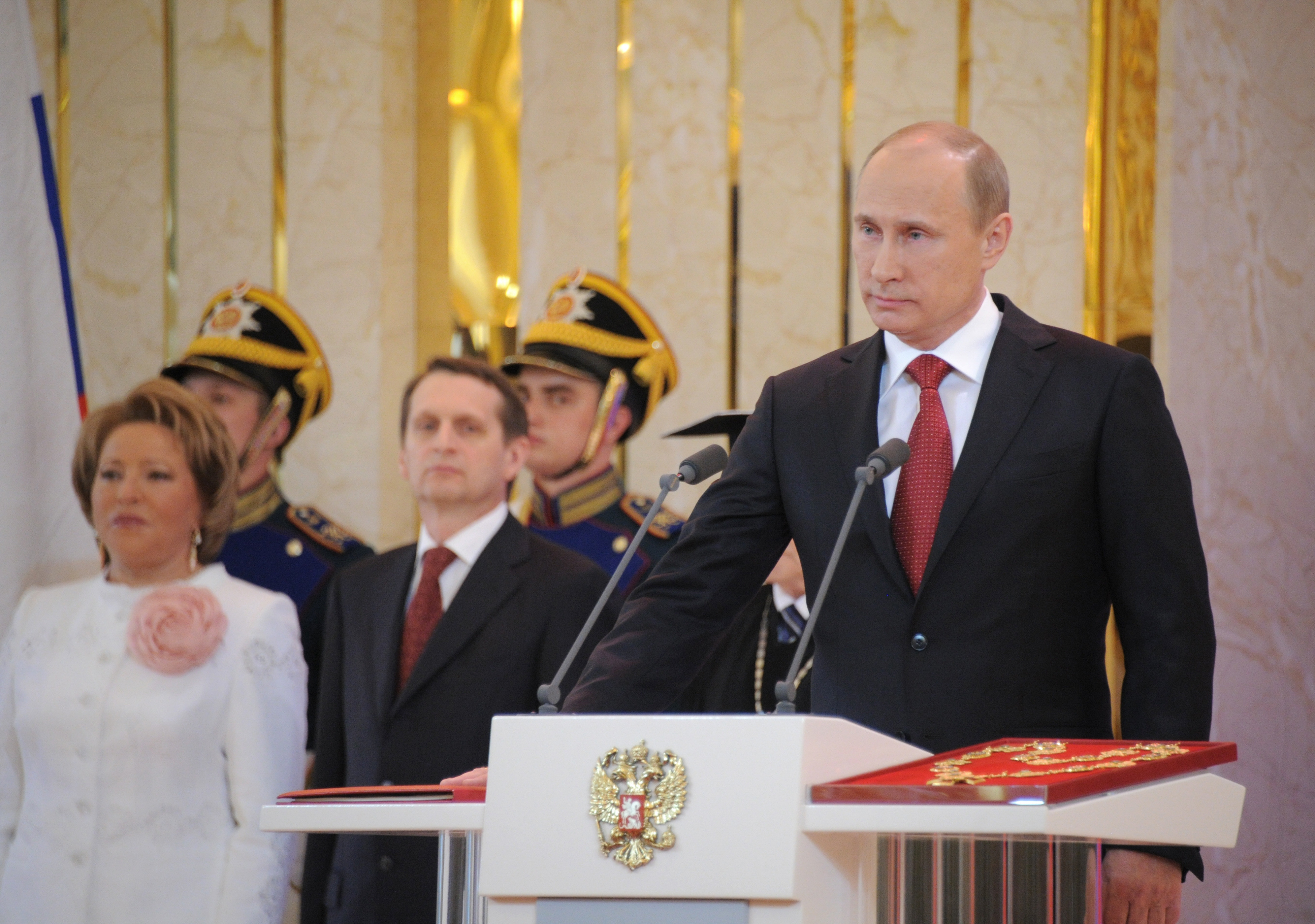 La ceremonia de inauguración de Vladímir Putin como Presidente de Rusia.